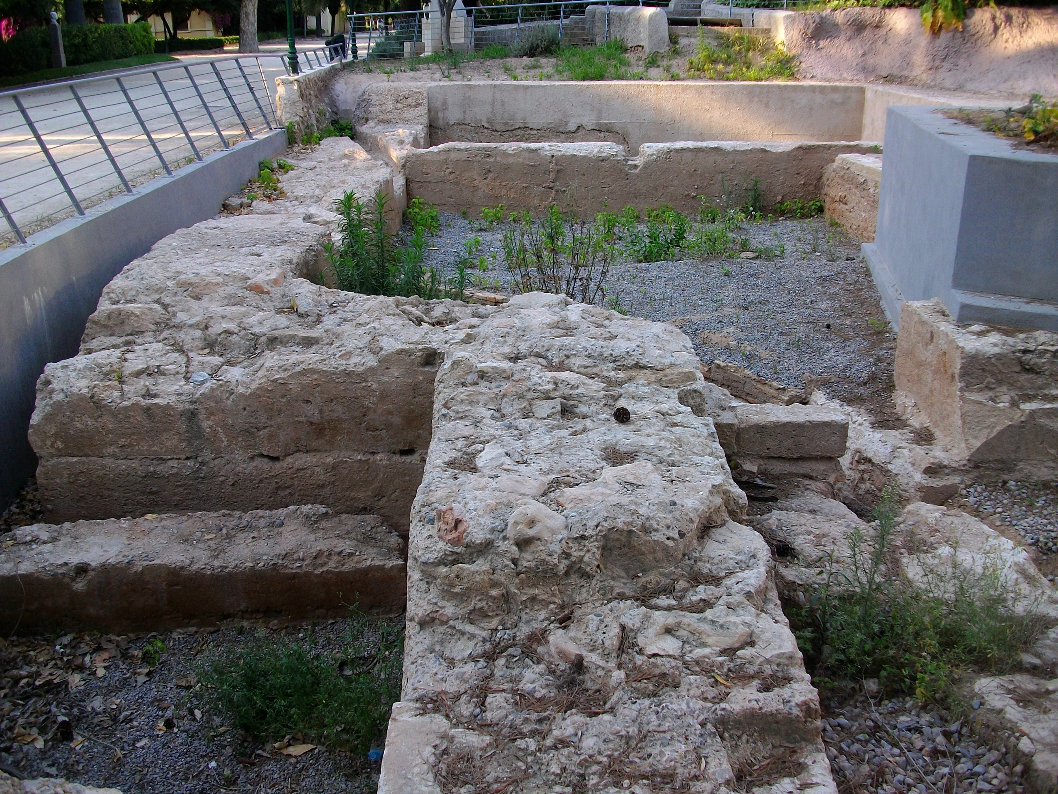 Torre de la Reina del palau del Real de València. Pere el Cerimoniós va decretar formalment la separació física dels espais privats del rei i la reina al palau, establint-se aquestos últims en la part més occidental del Real, al voltant del pati menut. Especialment significativa va ser la llarga estada de Maria de Castella, esposa d'Alfons el Magnànim, que va viure al palau fins la seua mort el 1458. Durant el temps que va residir al Real, aquesta zona va ser remodelada en diverses ocasions per allotjar les dames i donzelles que hi tenia al seu servici. Les estances de la reina estaven decorades amb tapissos i cortinatges en les finestres, a l'igual que l'església situada en la part posterior, on la reina assistia als oficis religiosos. Des del seu origen aquesta torre també va ser un dels elements defensius més destacats del Real.